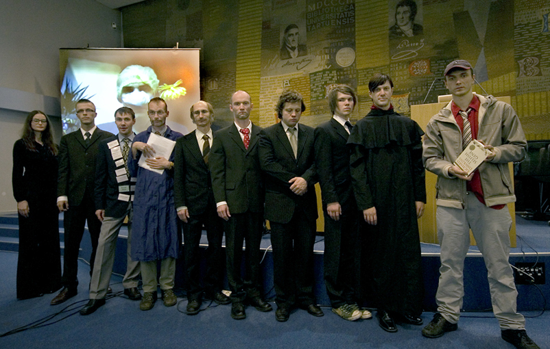 Rahvusvaheline konverents, teaduslik konverents 2010. Grupipilt.